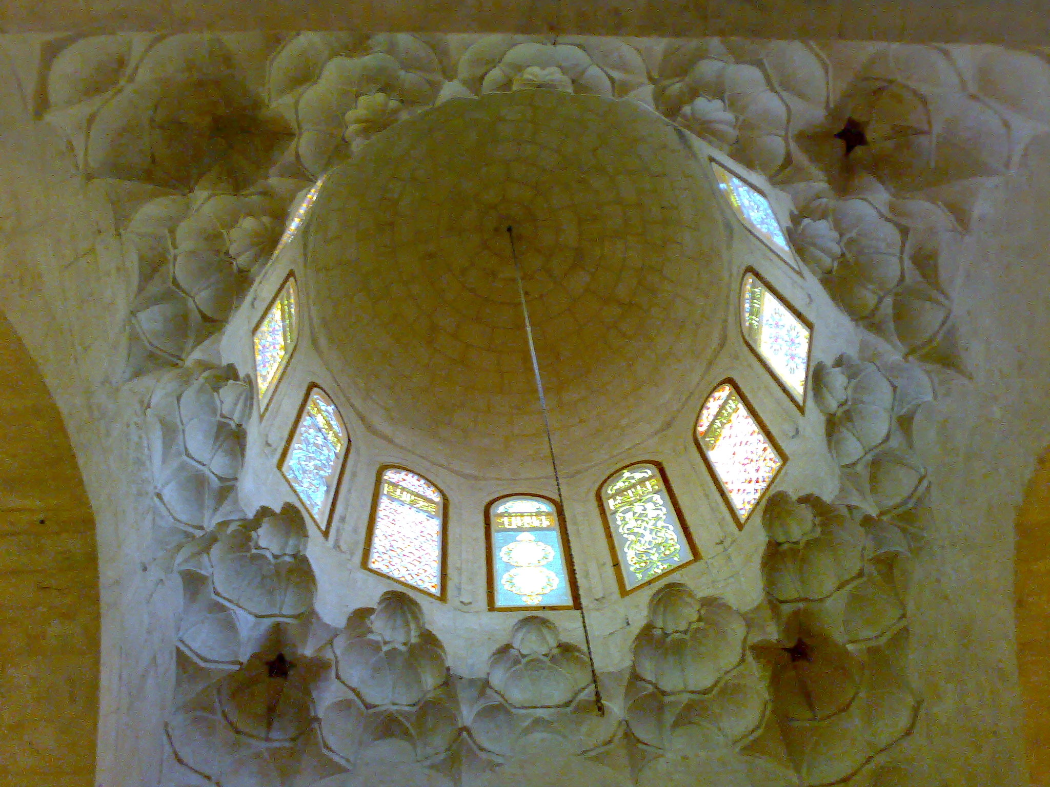 Jaoulia Dome